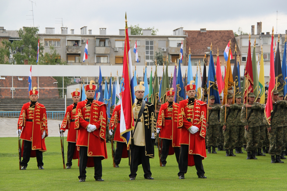 Pripadnici Počasno-zaštitne bojne u odorama 1. gardijske počasne bojne na stadionu u Kranjčevićevoj ulici na obilježavanju dvadesete obljetnice Oružanih snaga Republike Hrvatske i Dana Hrvatske kopnene vojske.